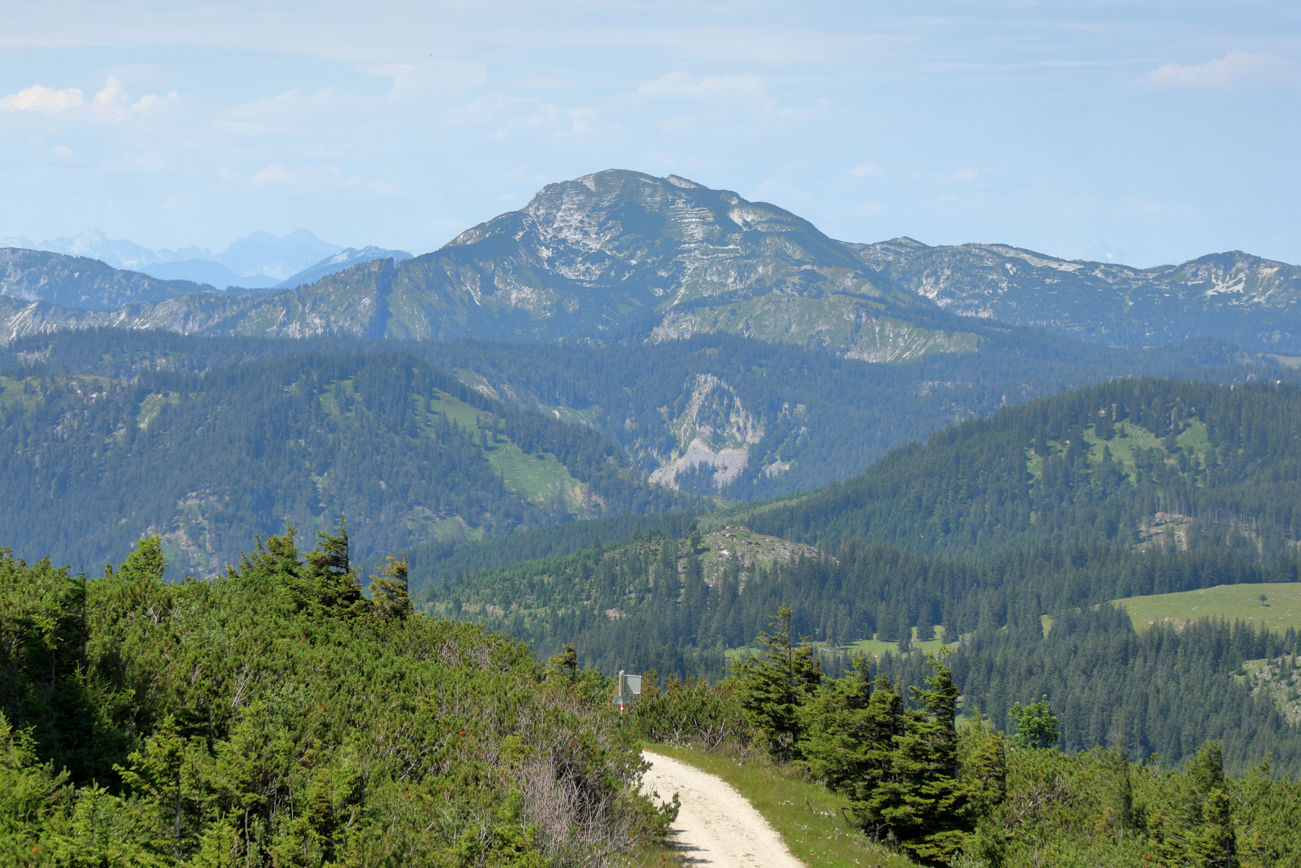 Blick von der 1626 m hohen Gemeindealpe (Gemeinde Mitterbach am Erlaufsee) auf den Dürrenstein bzw. Ostansicht des 1878 m hohen Dürrensteins.